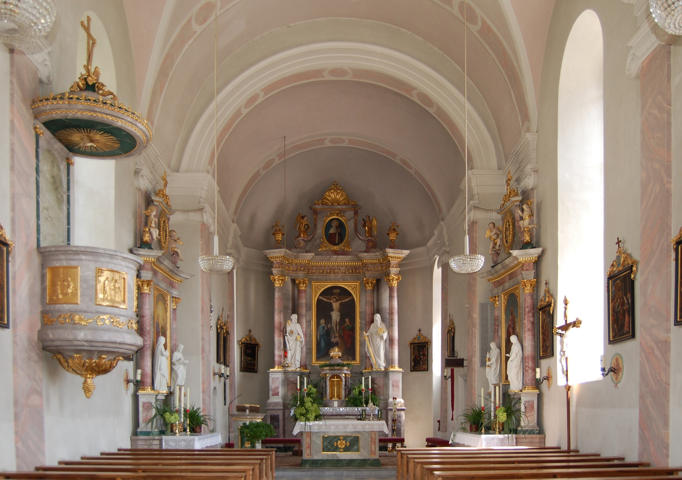 Nußdorfer Pfarrkirche